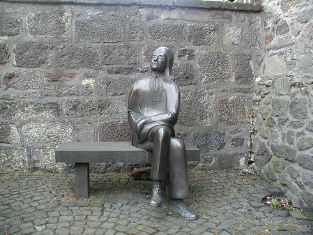 Bärtzebürger-Denkmal in Allendorf (Lumda) Bild: (c) Stephan Tscherny